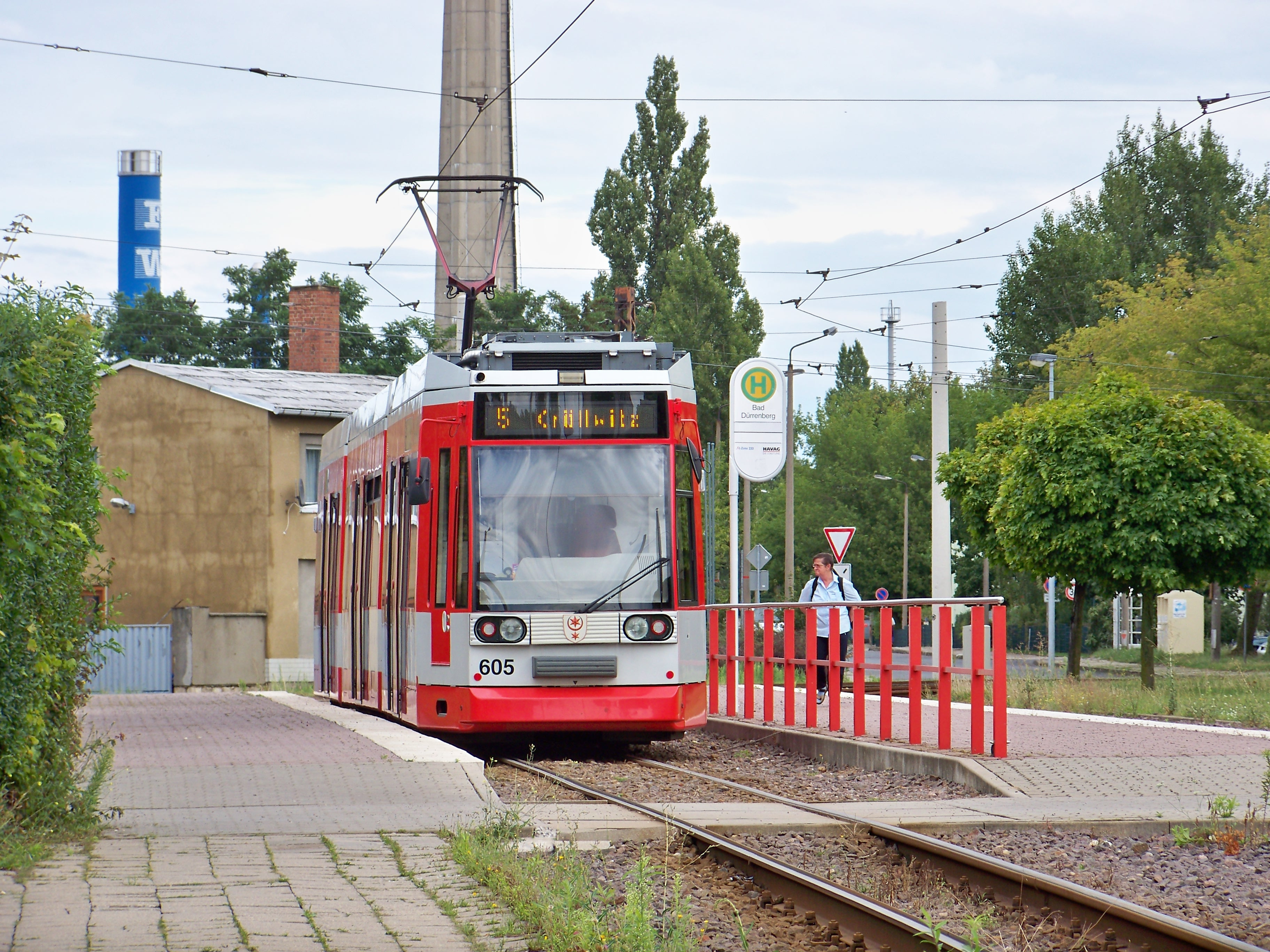 Straßenbahn der Linie 5 des Halleschen Verkehrsunternehmens HAVAG an der Endstelle Bad Dürrenberg Richtung Kröllwitz